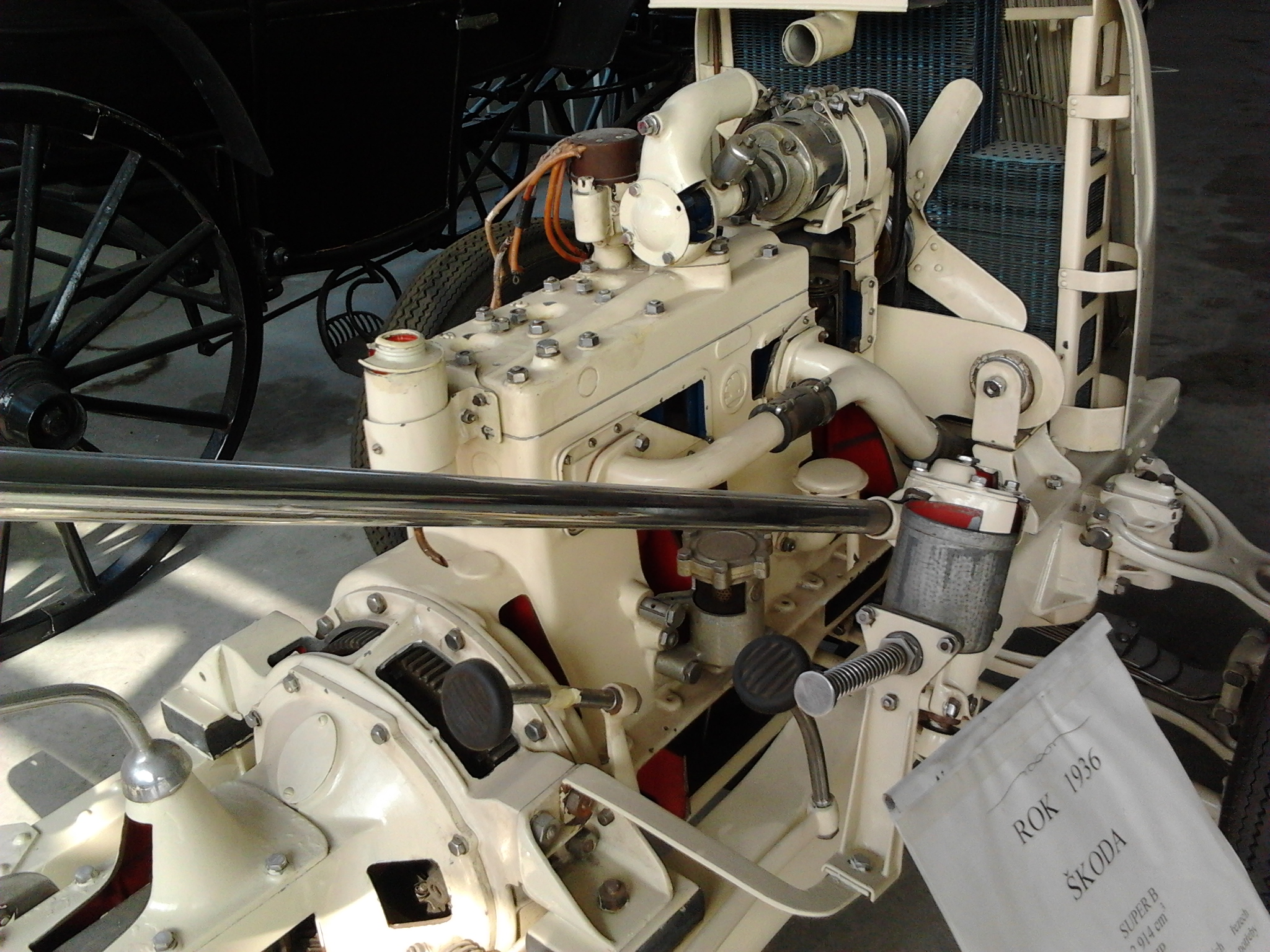 Motor ze Škoda Superb B 1936